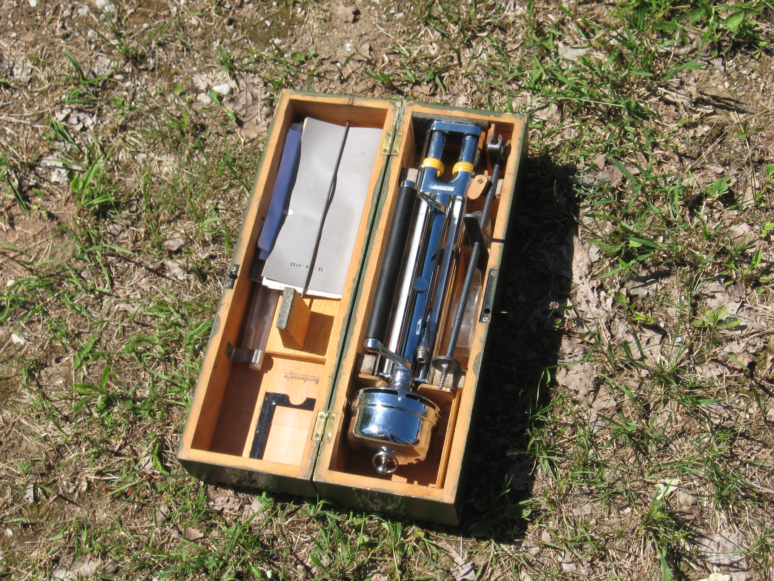 Assmanni psühromeeter